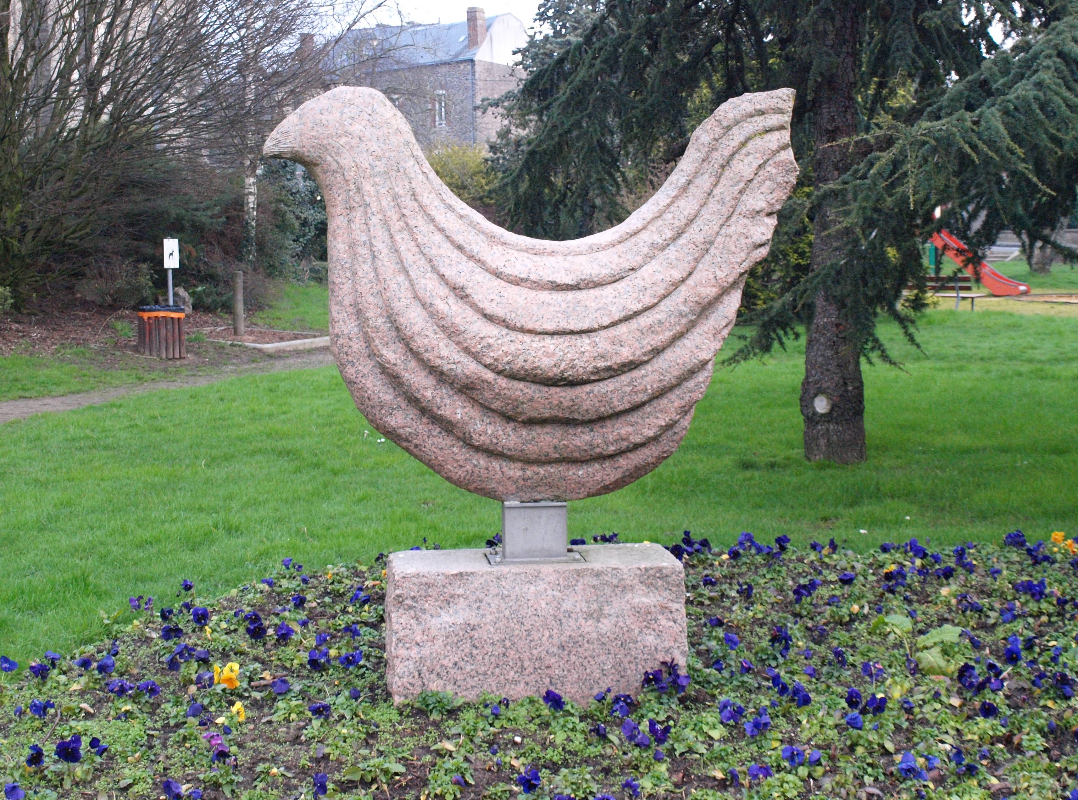 Janzé (Ille-et-Vilaine, France) ; statue près de l'église.